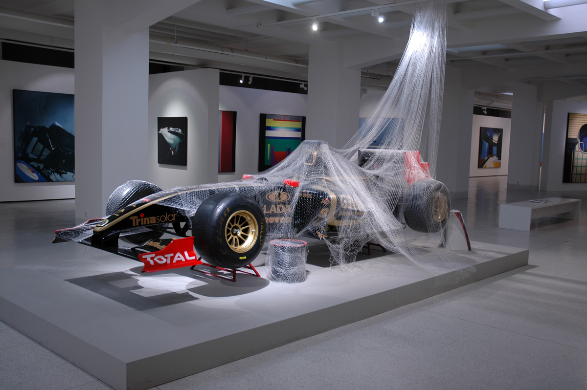 Theodor Pištěk, instalace NG Praha, 2012